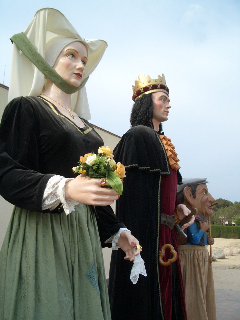 Els gegants de Sant Pere de Vilamajor, l'Alfons, la Loreto i en Quico del Montseny